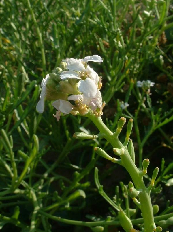 Cakile maritime, Talmont-Saint-Hilaire, juillet 2004